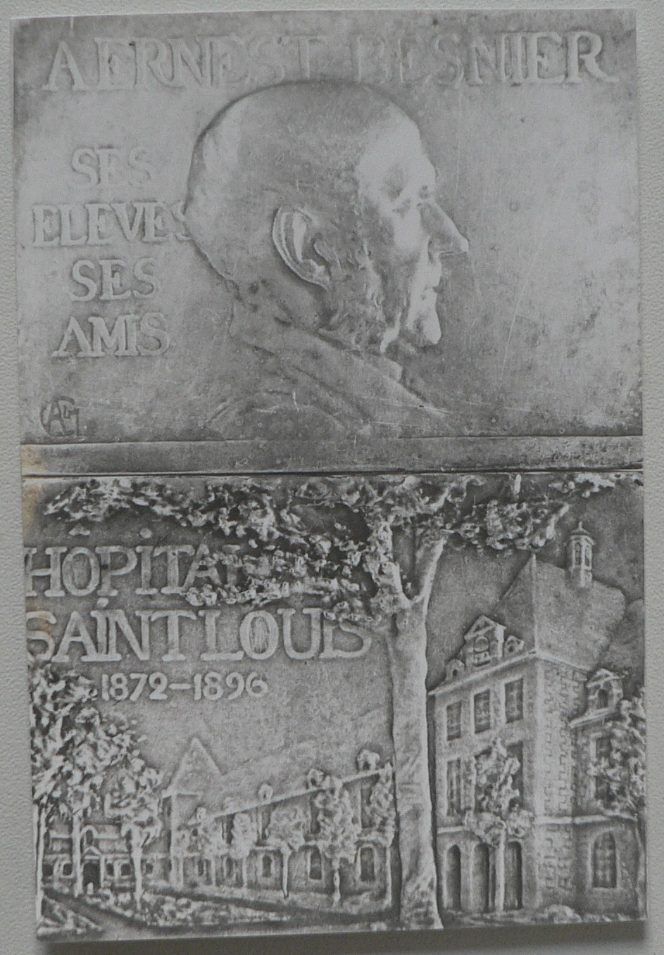 Plaque souvenir